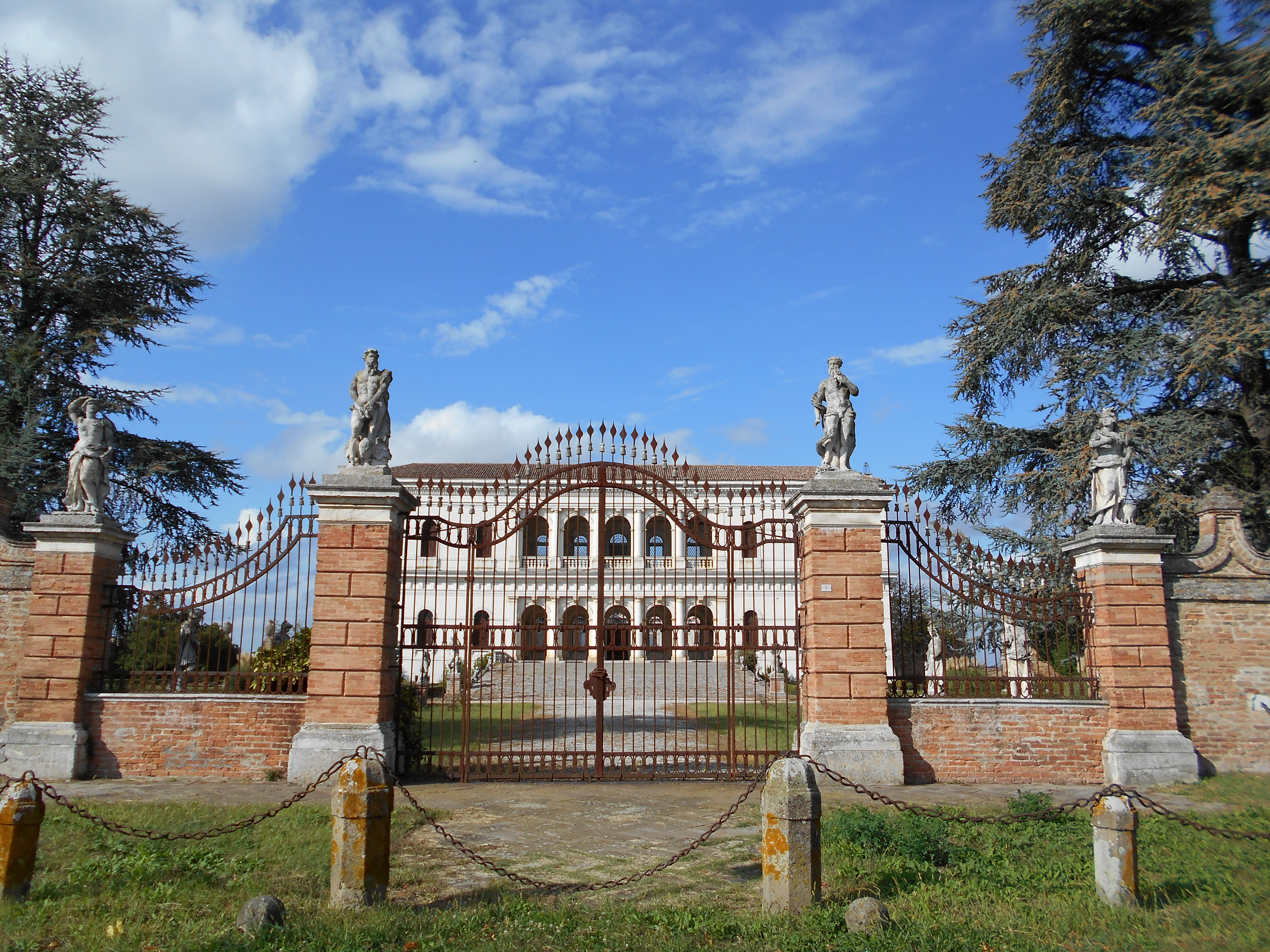 Villa Garzoni, Pontecasale, Candiana di Jacopo Sansovino